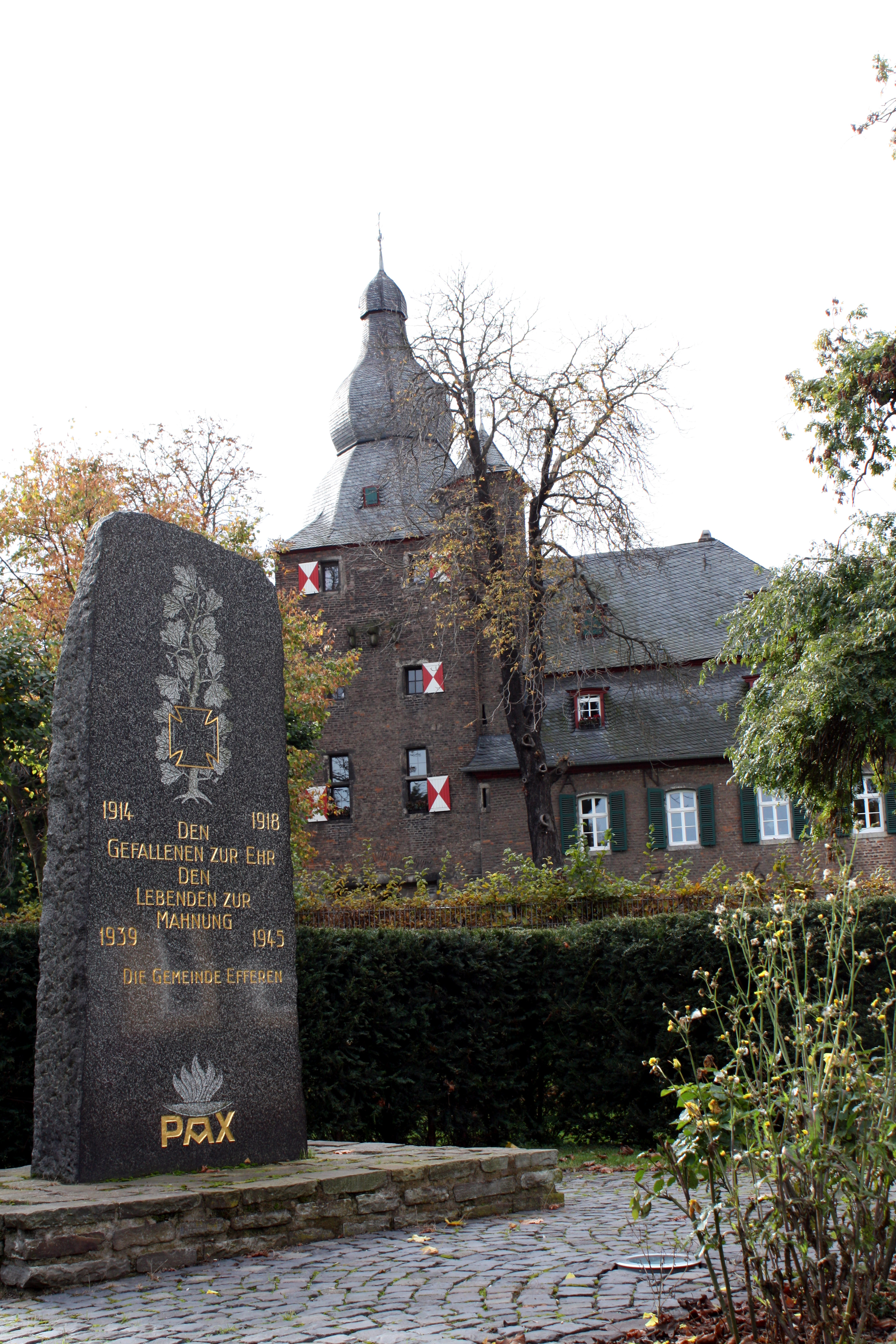 Efferen, Ehrenmal